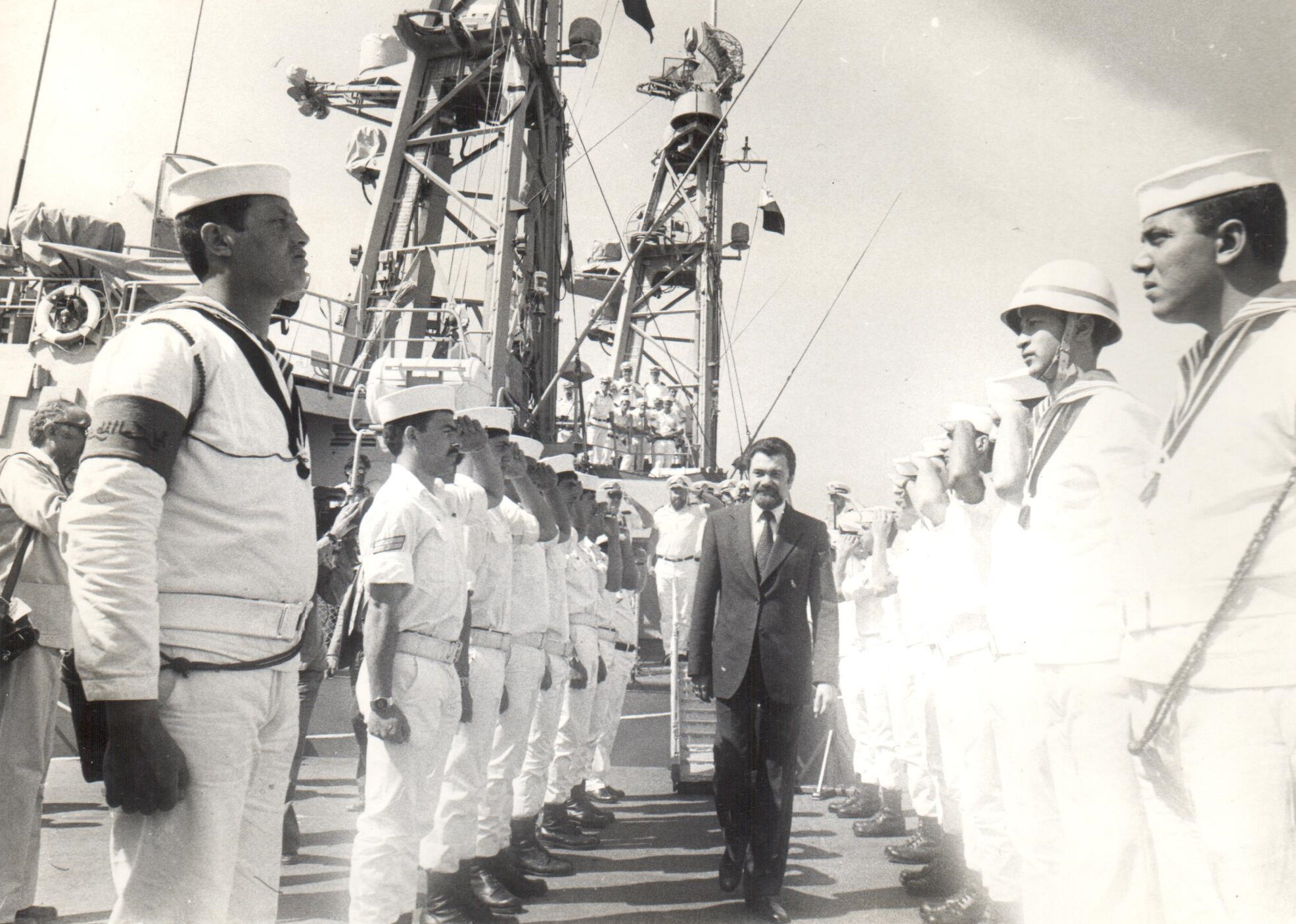 משמר כבוד מצרי מקבל את שגריר ישראל בן אלישר